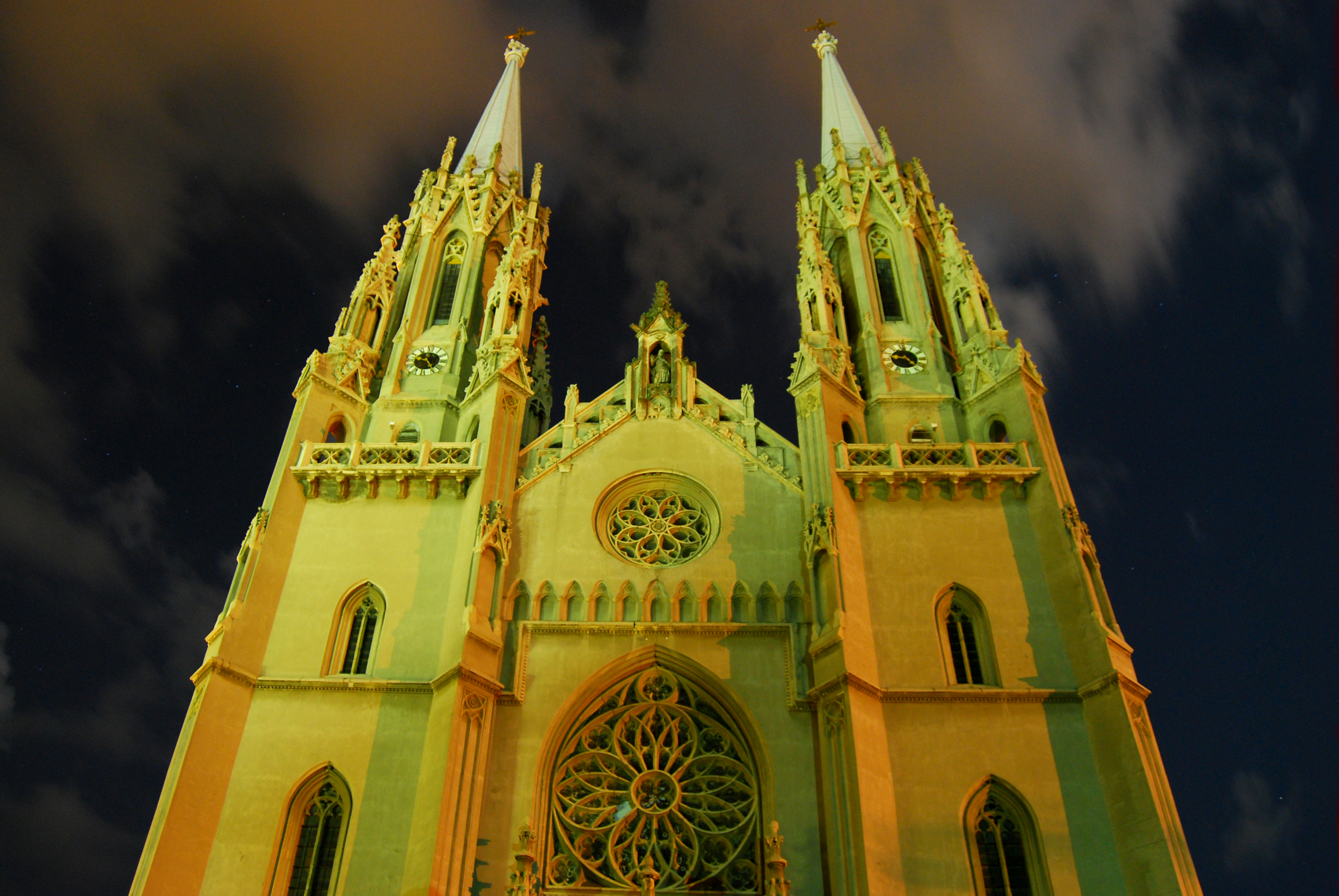 Римокатоличка црква Св. Герхарда де Сангредо У Вршцу, улица Жарка Зрењанина број 31